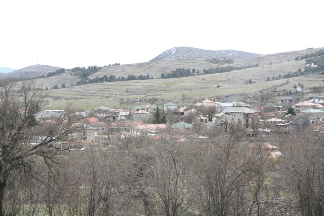 Voskopojë, Albania